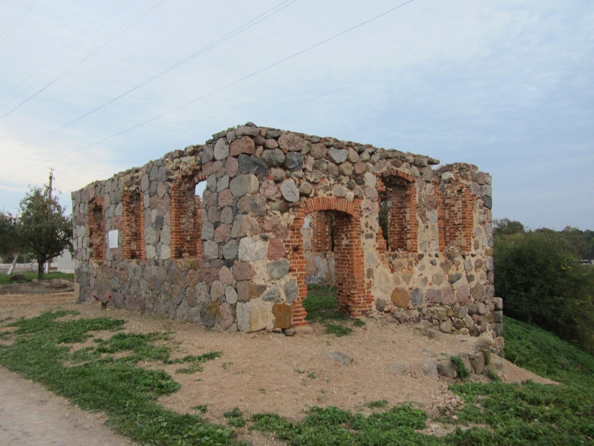 Краявіды Лужкоў